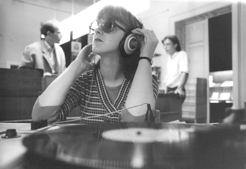 Leipzig, Musikbibliothek, Nutzerin Zum Beitrag: Schätze, die nicht verstauben - Erkundungen in einem Haus voller Musik ADN-ZB Grubitzsch - 27.8.1985 - Platten können in der Musikbibliothek der Stadt Leipzig in der Ferdinand-Lassalle-Straße an Ort und Stelle abgehört werden. Insgesamt besitzt die Musikbibliothek einen Bestand von rund 160.000 Bänden Musikliteratur, Musikalien, Autographen, Handschriften, seltenen Drucken, Schallplatten und Kassetten. (Hierzu gehören die Fotos 1985-0827-300N-302N!)